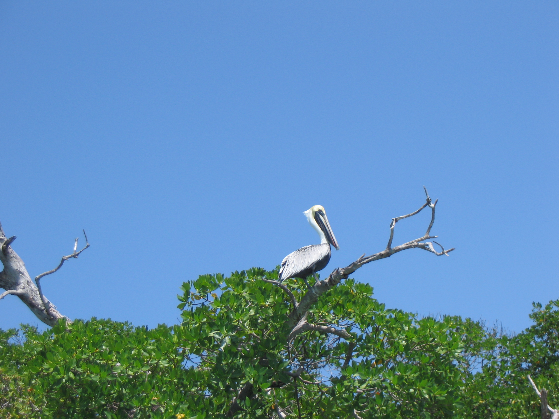 Pelicano en Sian Ka'an